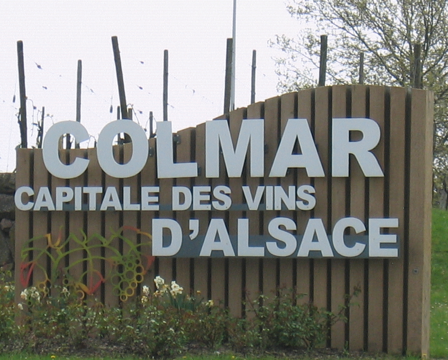 Colmar, Capitale des vins d'Alsace